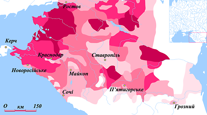 Українці на Кубані за переписом 1926 року Ukranians in Kuban in 1926 75—90% 50—75% 25—50% 10—25% 5—10% 2—5%